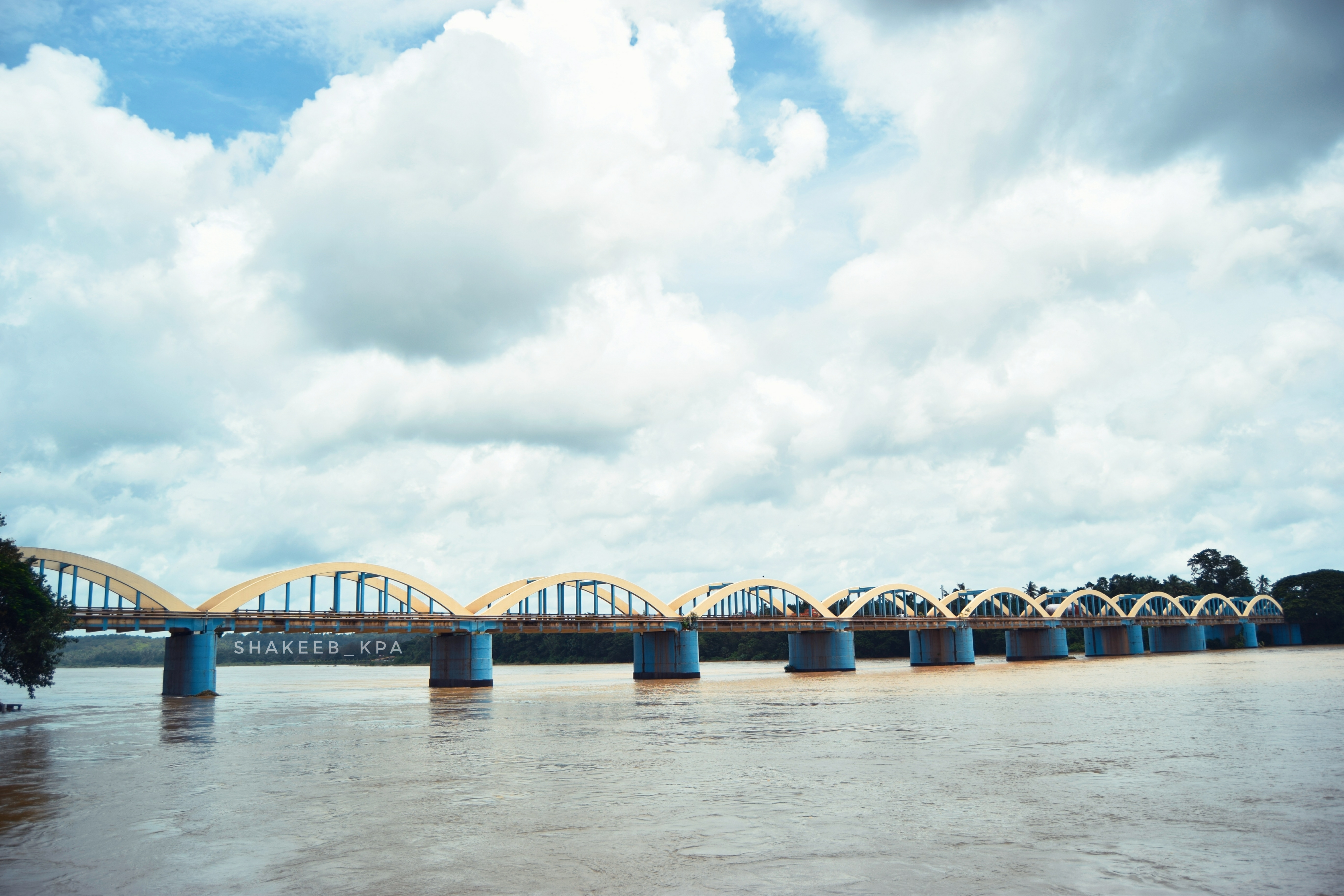 Kuttippuram Bridge